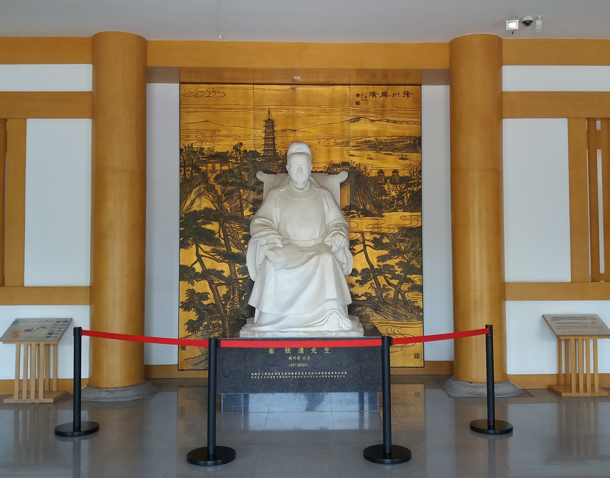 崔致远纪念堂中的崔致远汉白玉塑像